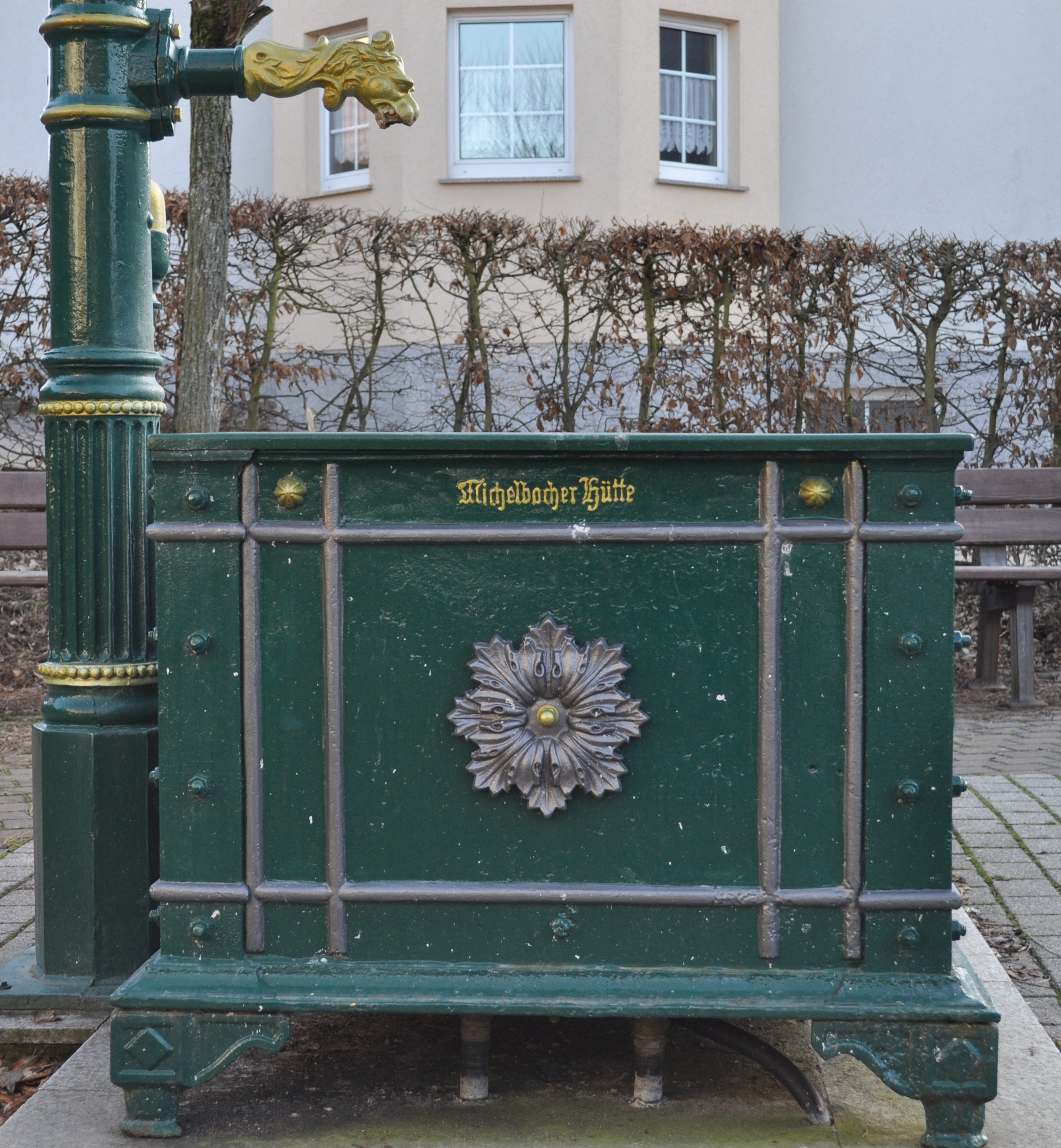 Detailansicht des Dasbacher Gusseisenbrunnens